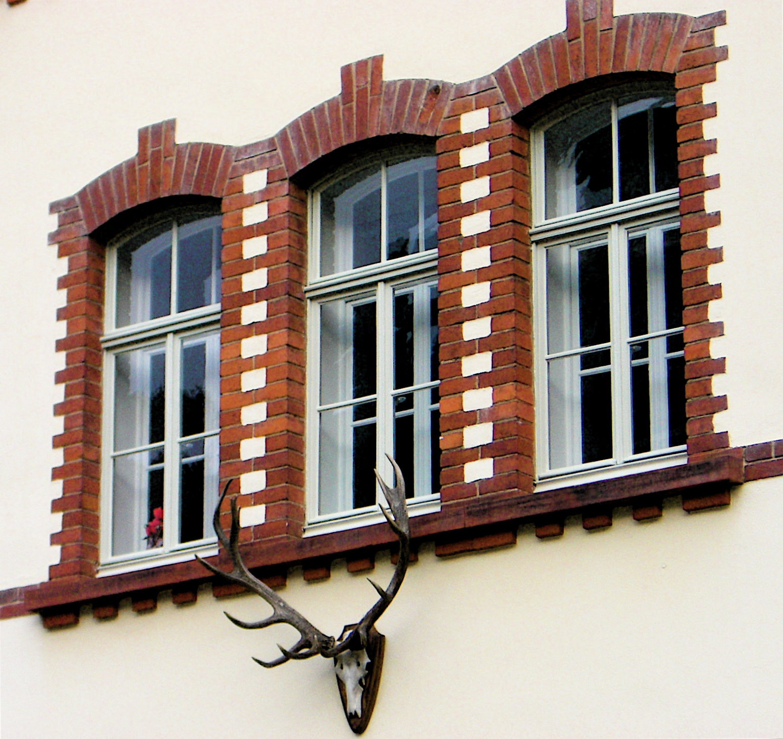 Kastenfenster nach der Restaurierung mit Leinölfarbe ohne Lösungsmittel.